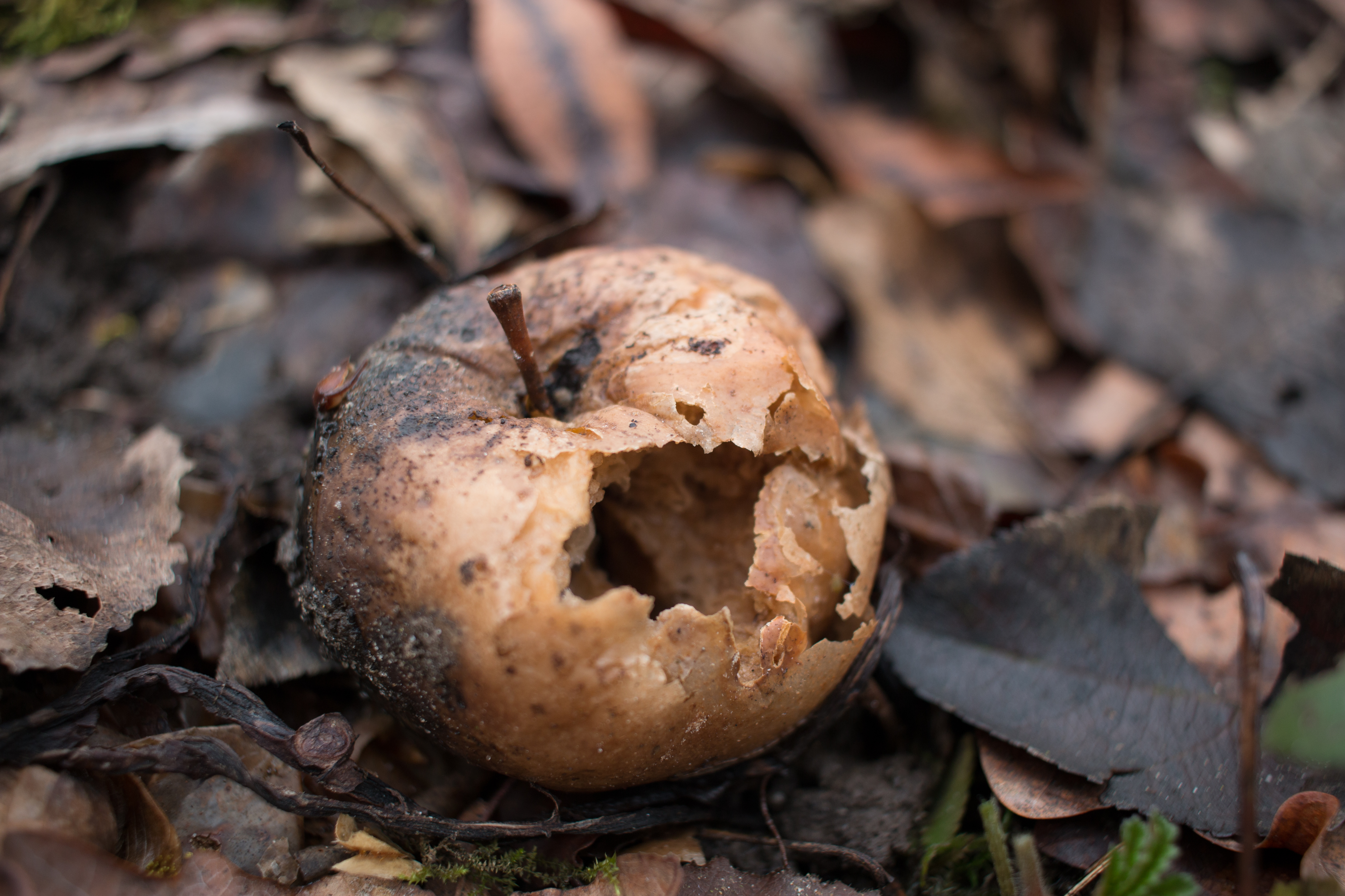 rottende appel